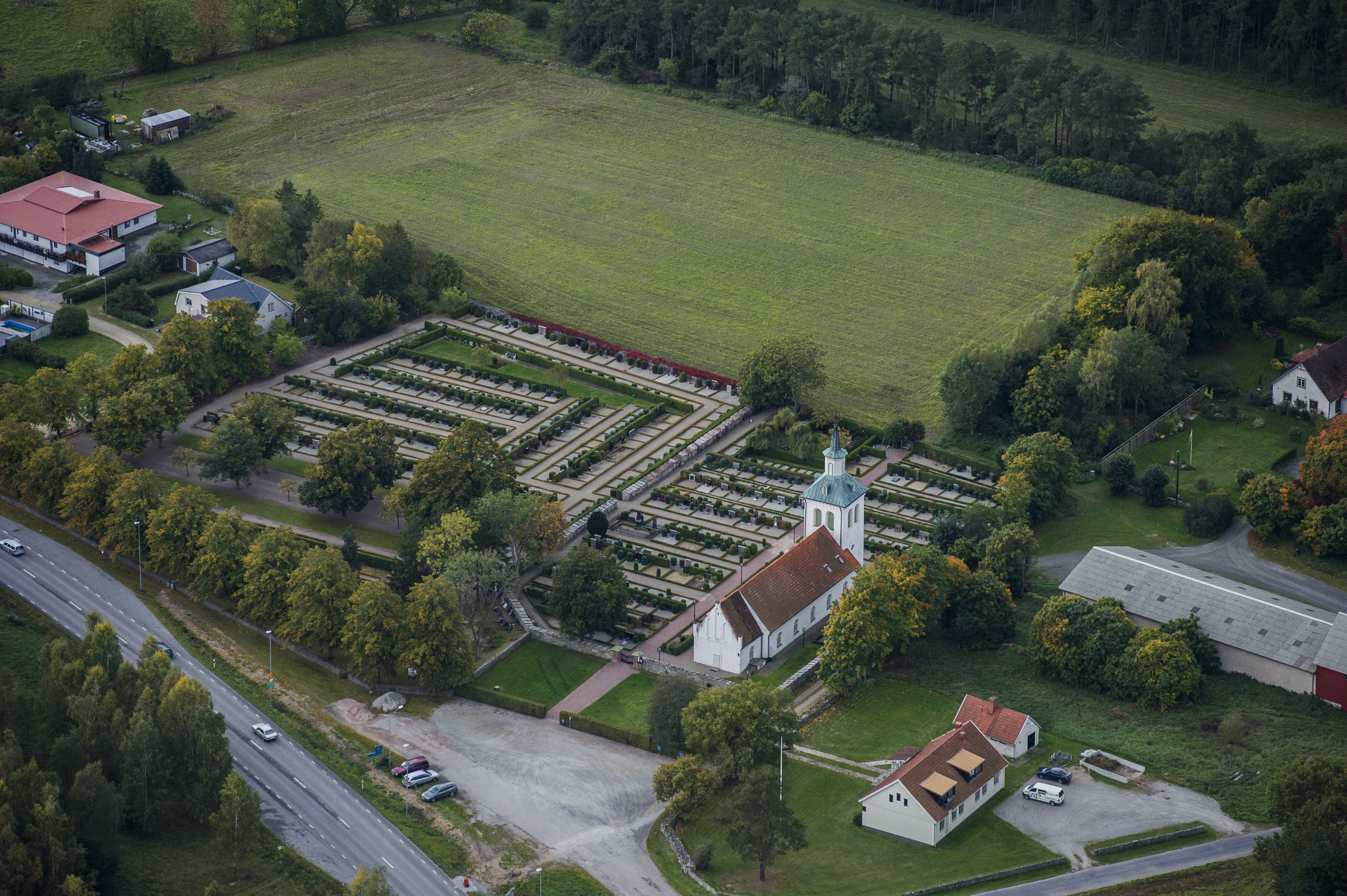 Ysane kyrka från luften